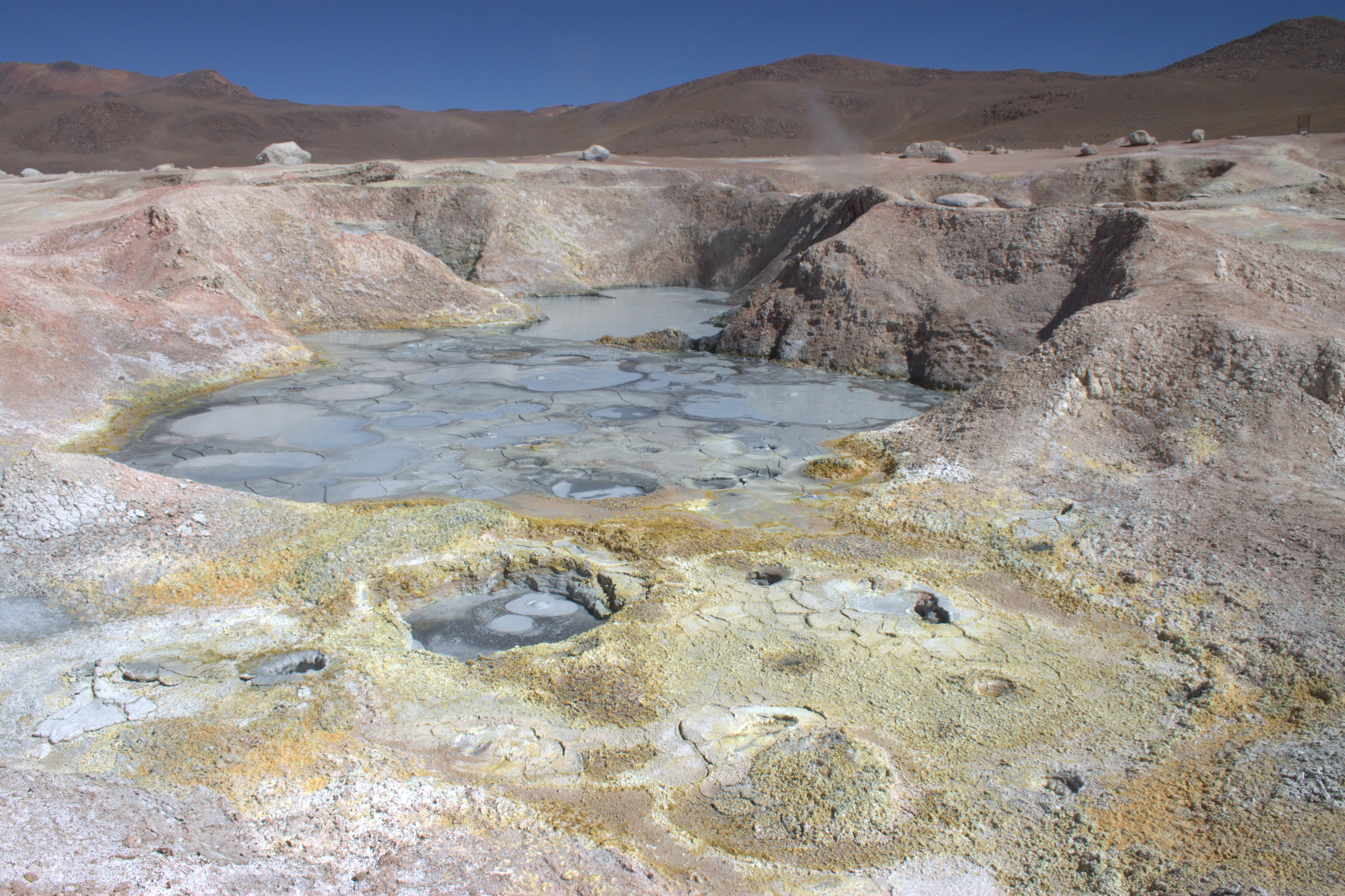 geotermální oblast se sirnými prameny v jižní Bolívii